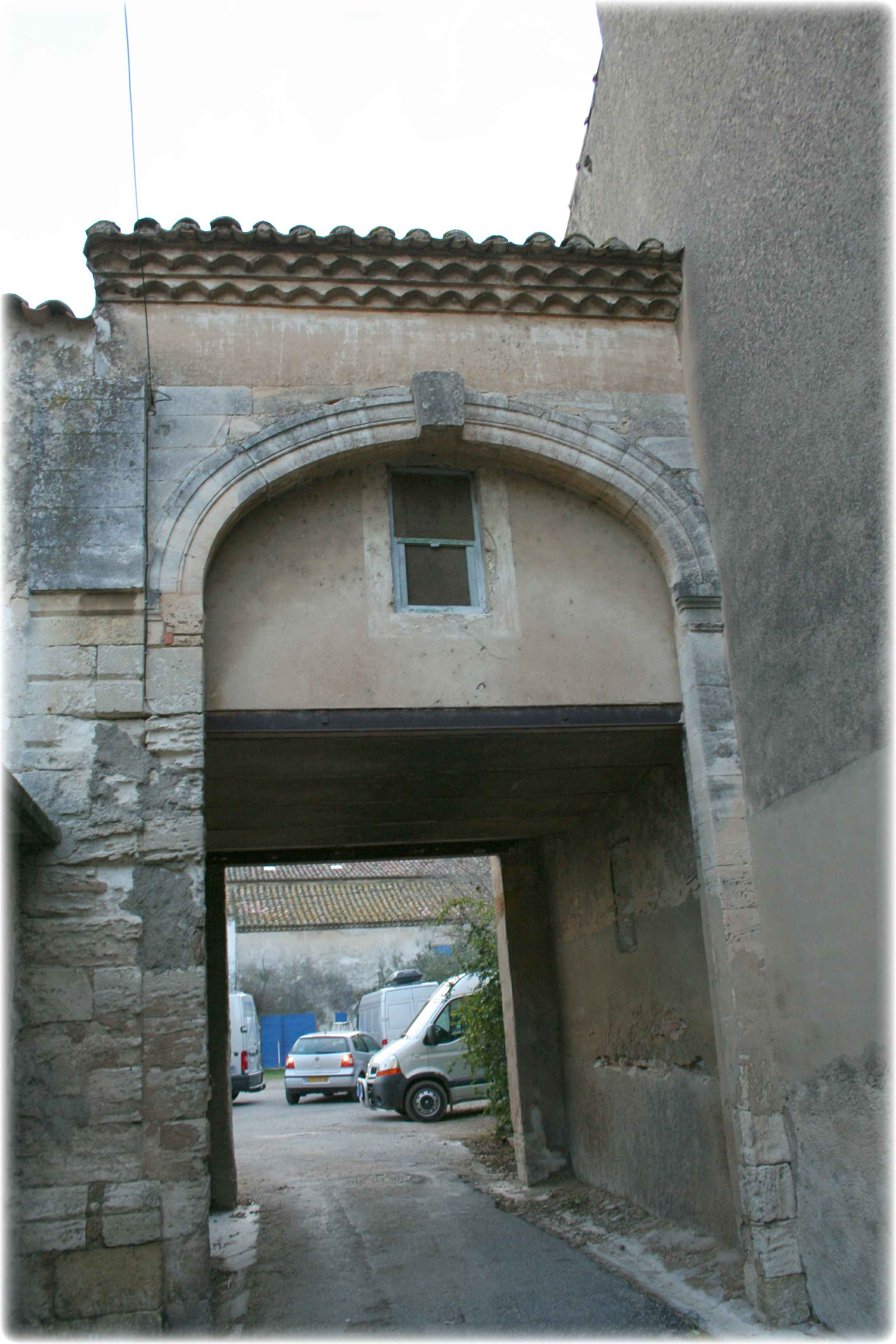 Franquevaux - Vestiges de l'abbaye Auteur: R. BENEZET Date : 21 02 2007